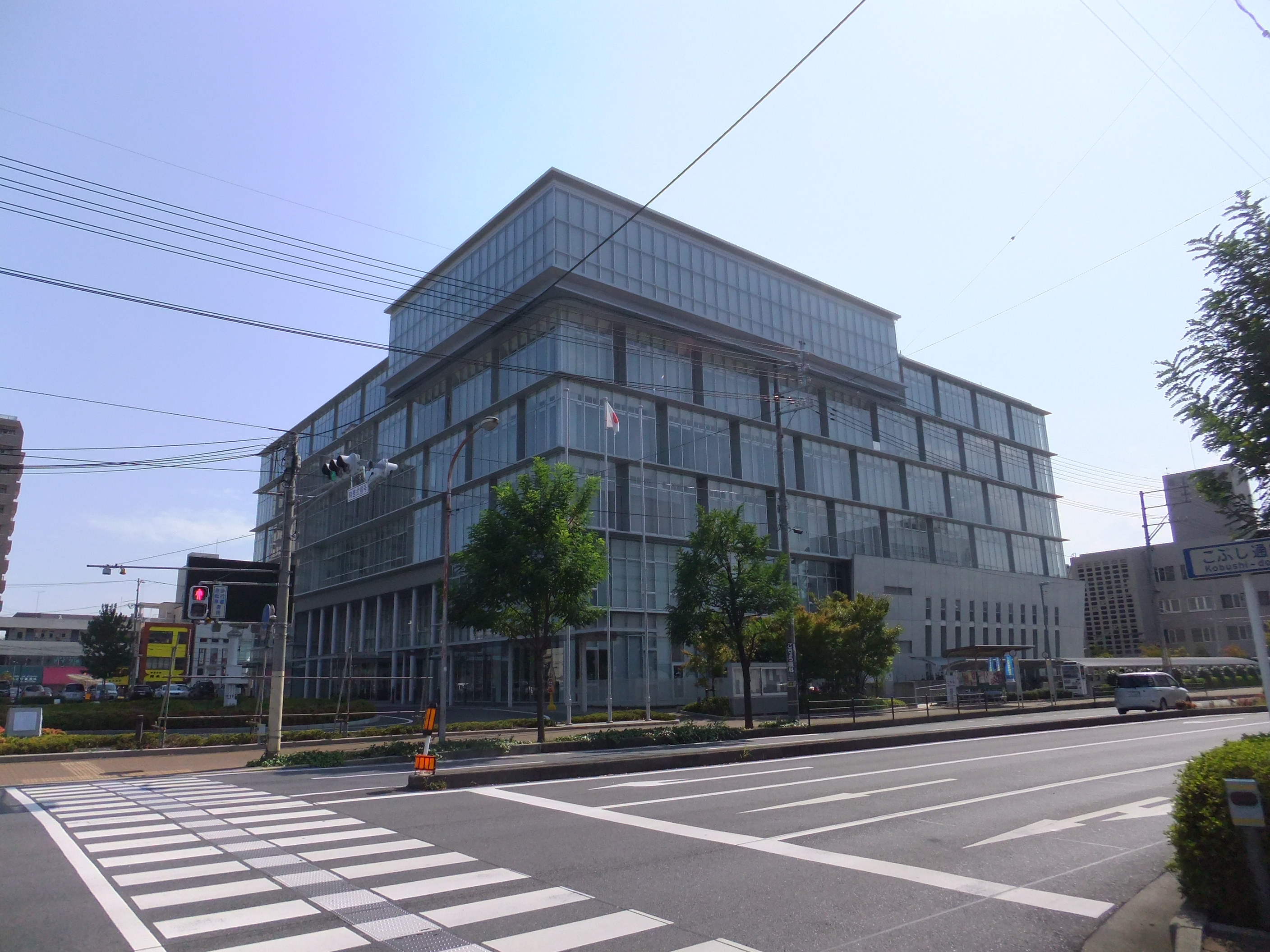 岩国市役所